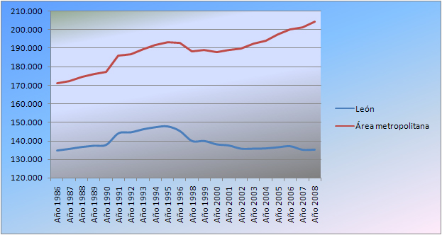 Gráfica de la evolución de la población en León (línea azul) y su área metropolitana (línea roja).